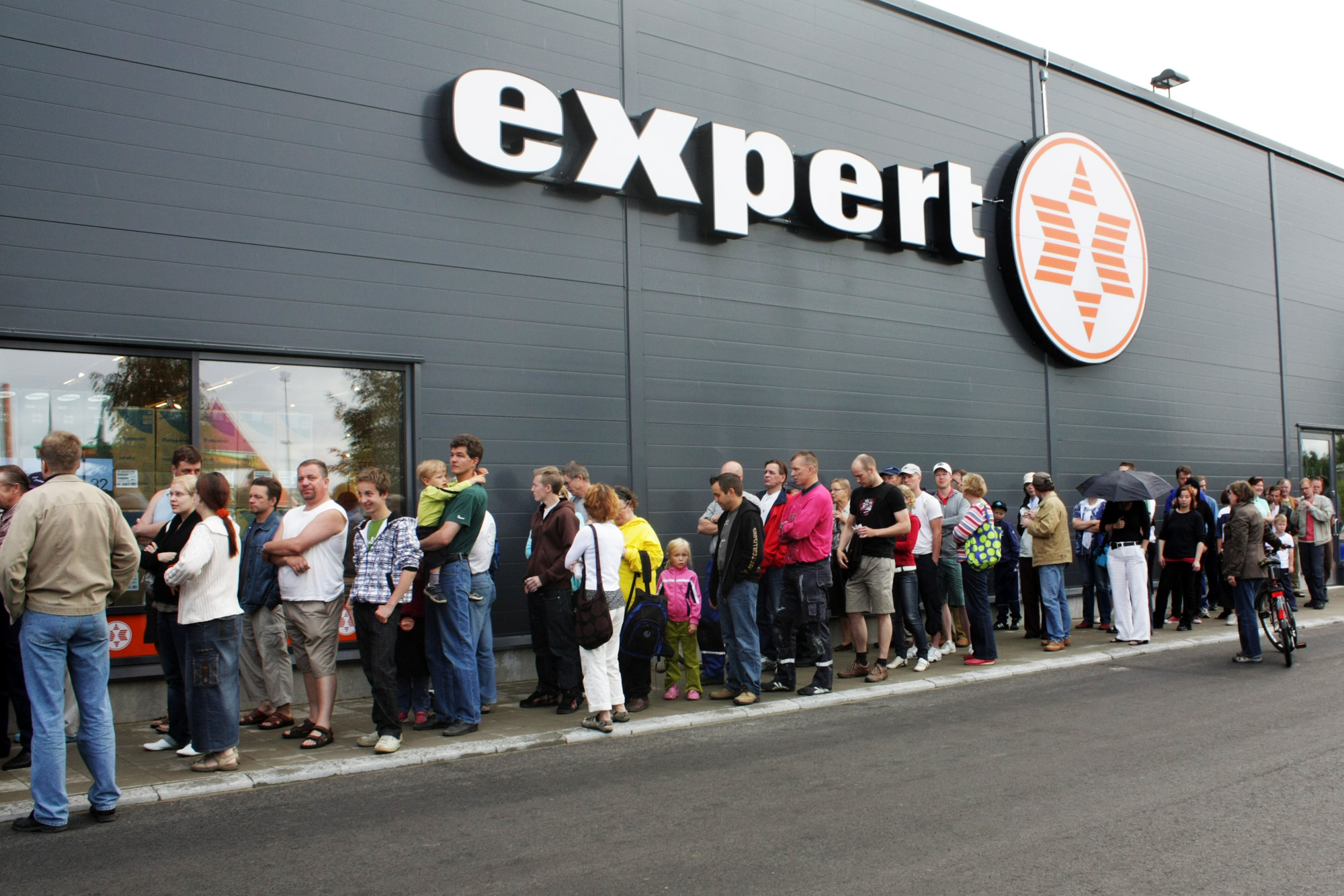 Jonoa Expert Rovaniemen edessä